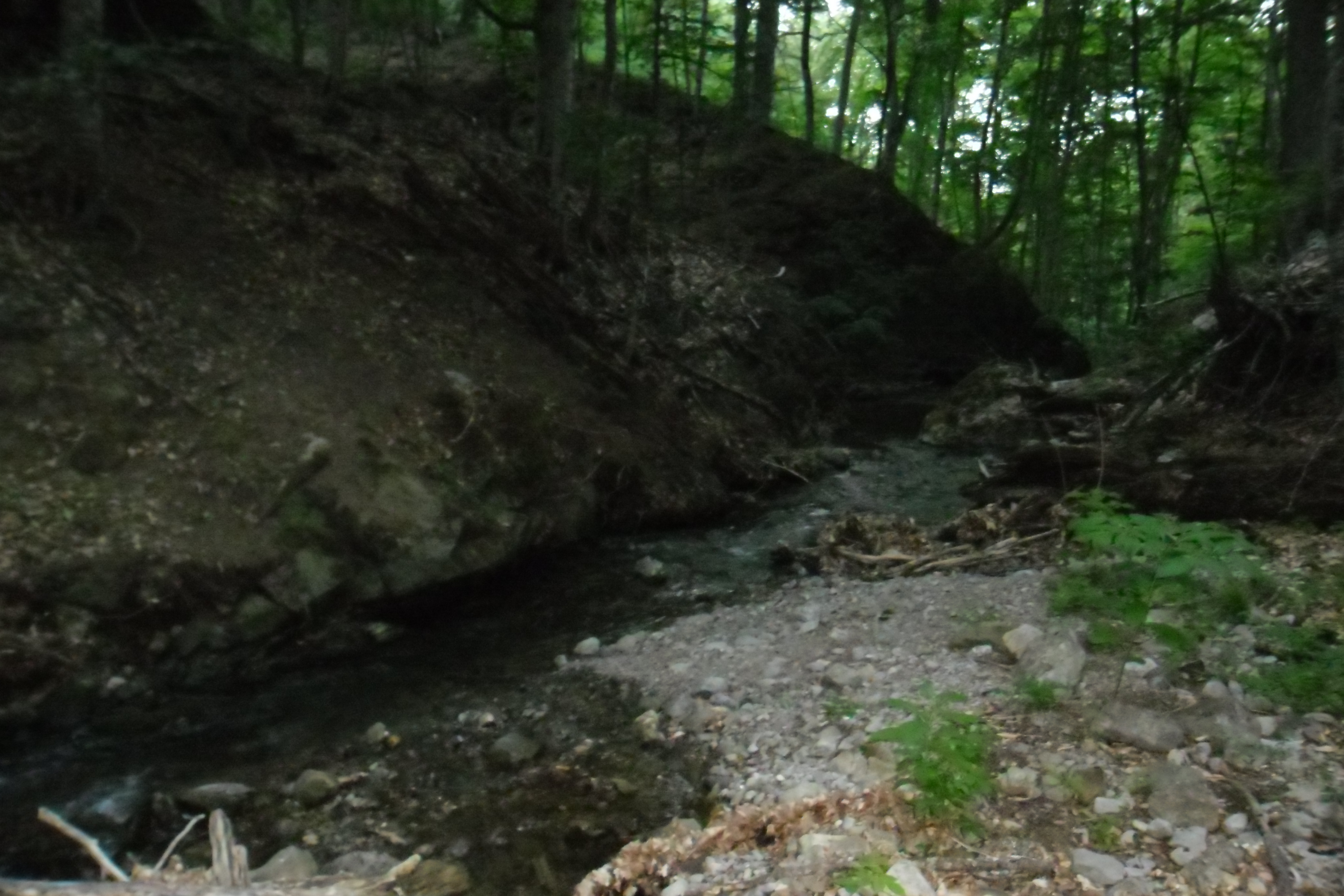 Узень-Баш: Фото